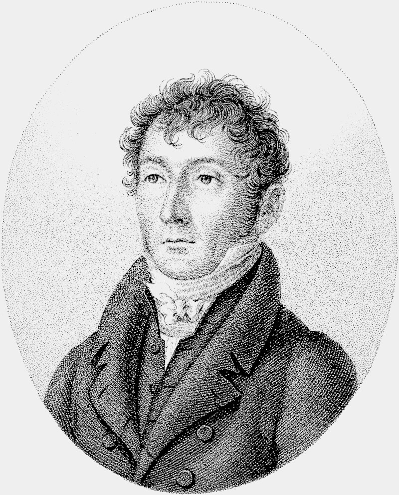 Portrait de Emmanuel Jobez